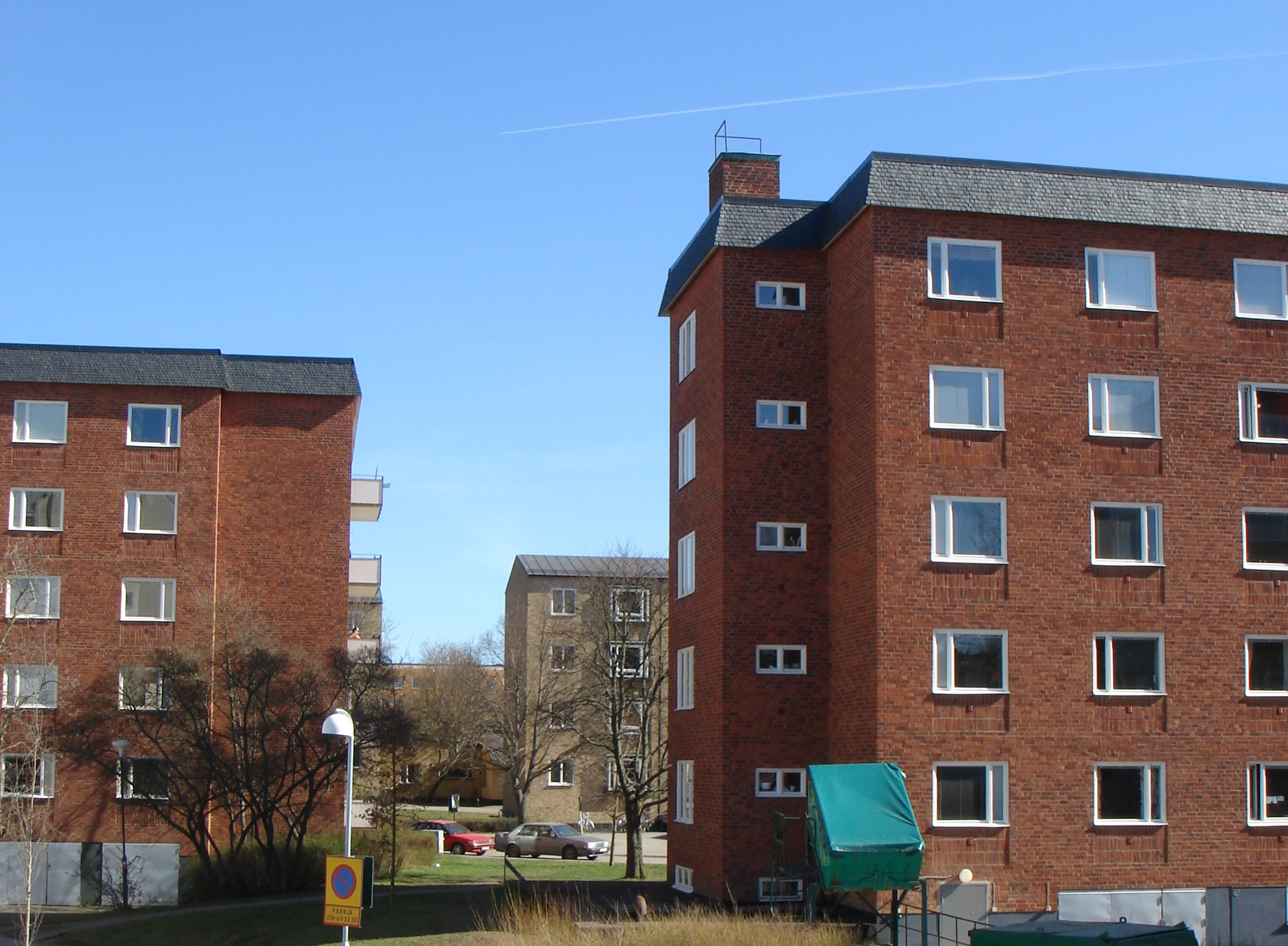 Norrlands nation. Dorms at Studentvägen. Uppsala universitet. Photo.